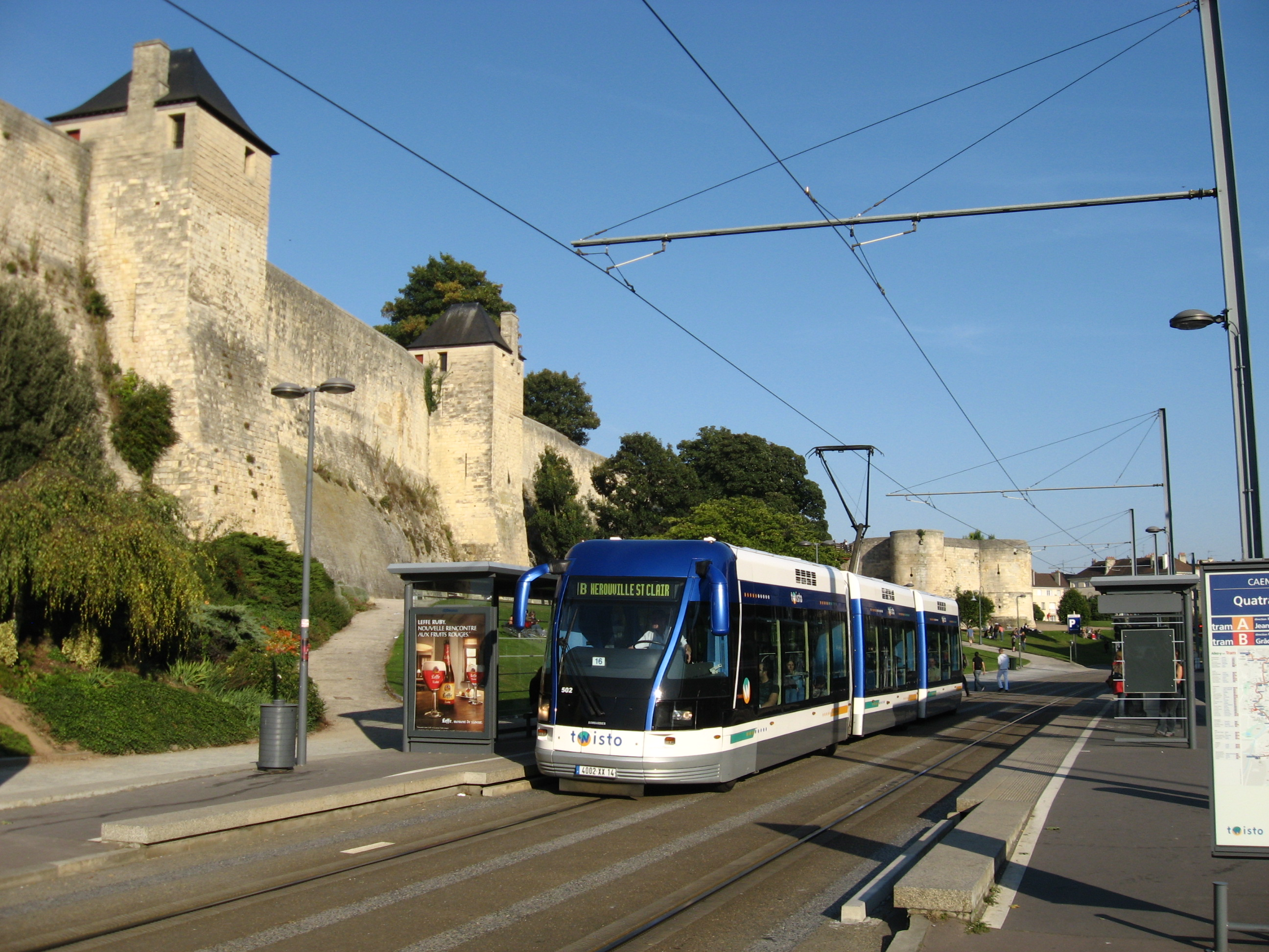 Rubberbandtram langs de kasteelmuren